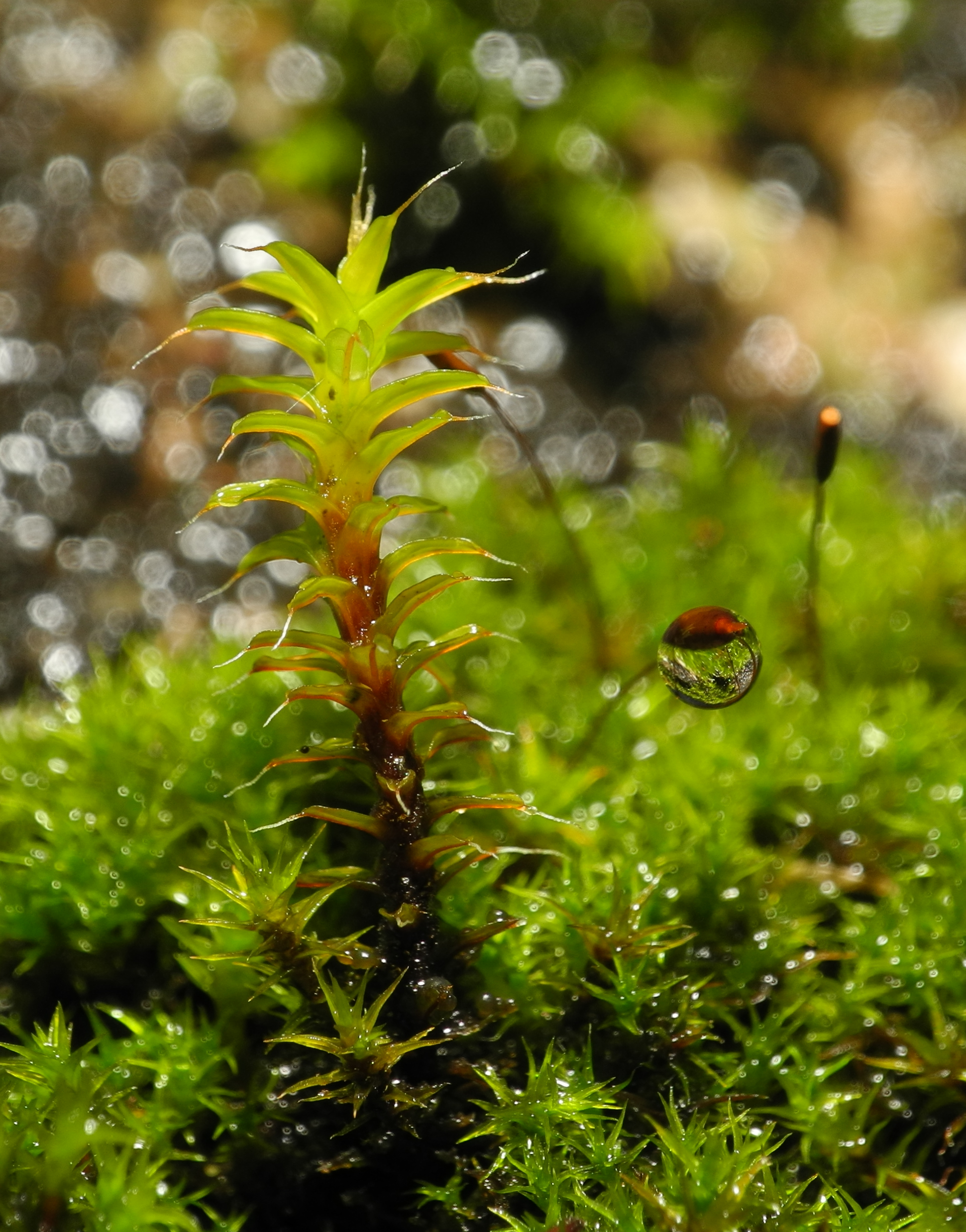 Goutte d'eau sur de la mousse (Bryophyta sp.). Image prise avec la bonnette Raynox DCR-250.